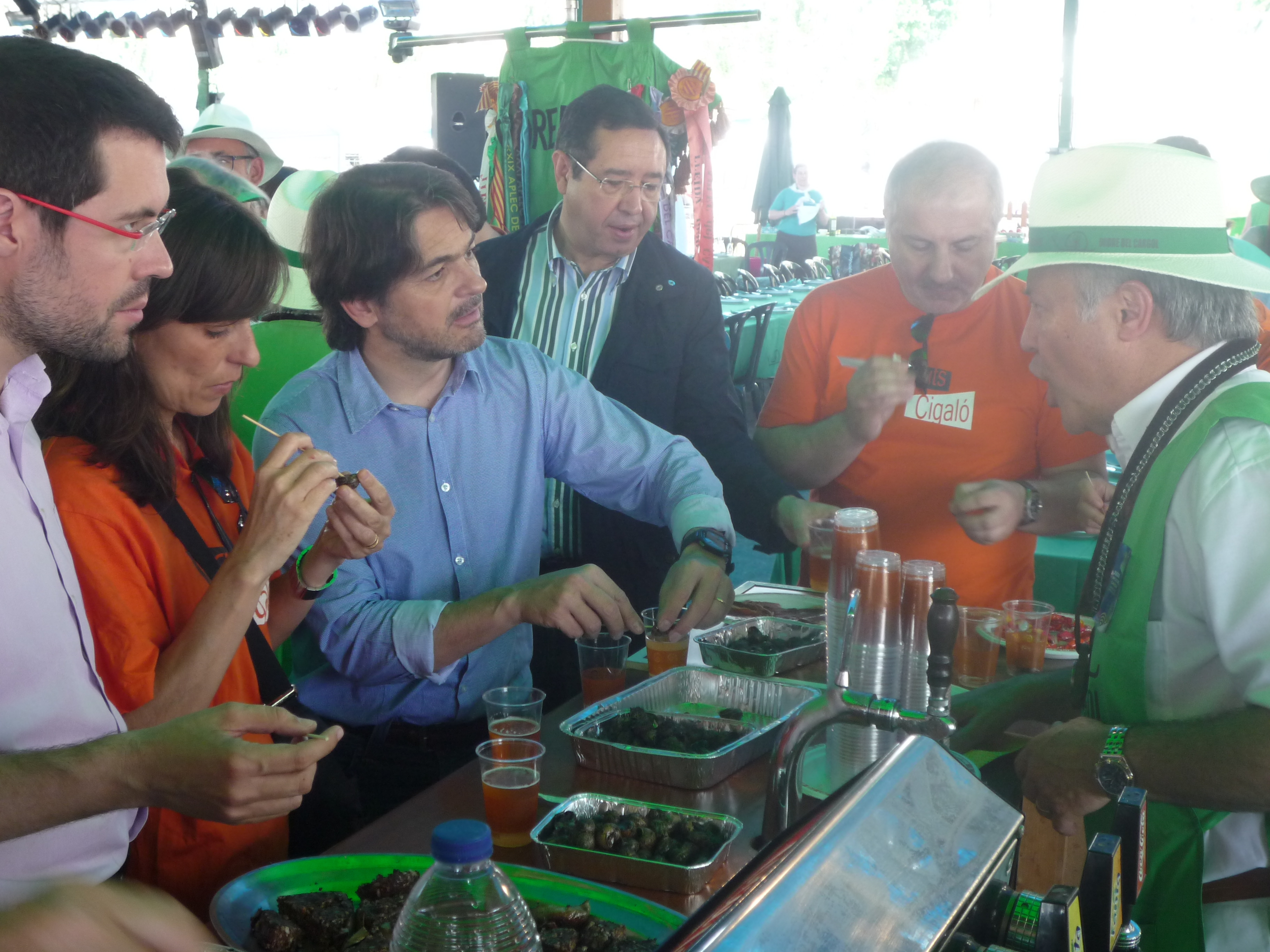 Oriol Pujol a l'Aplec del Cargol a Lleida.